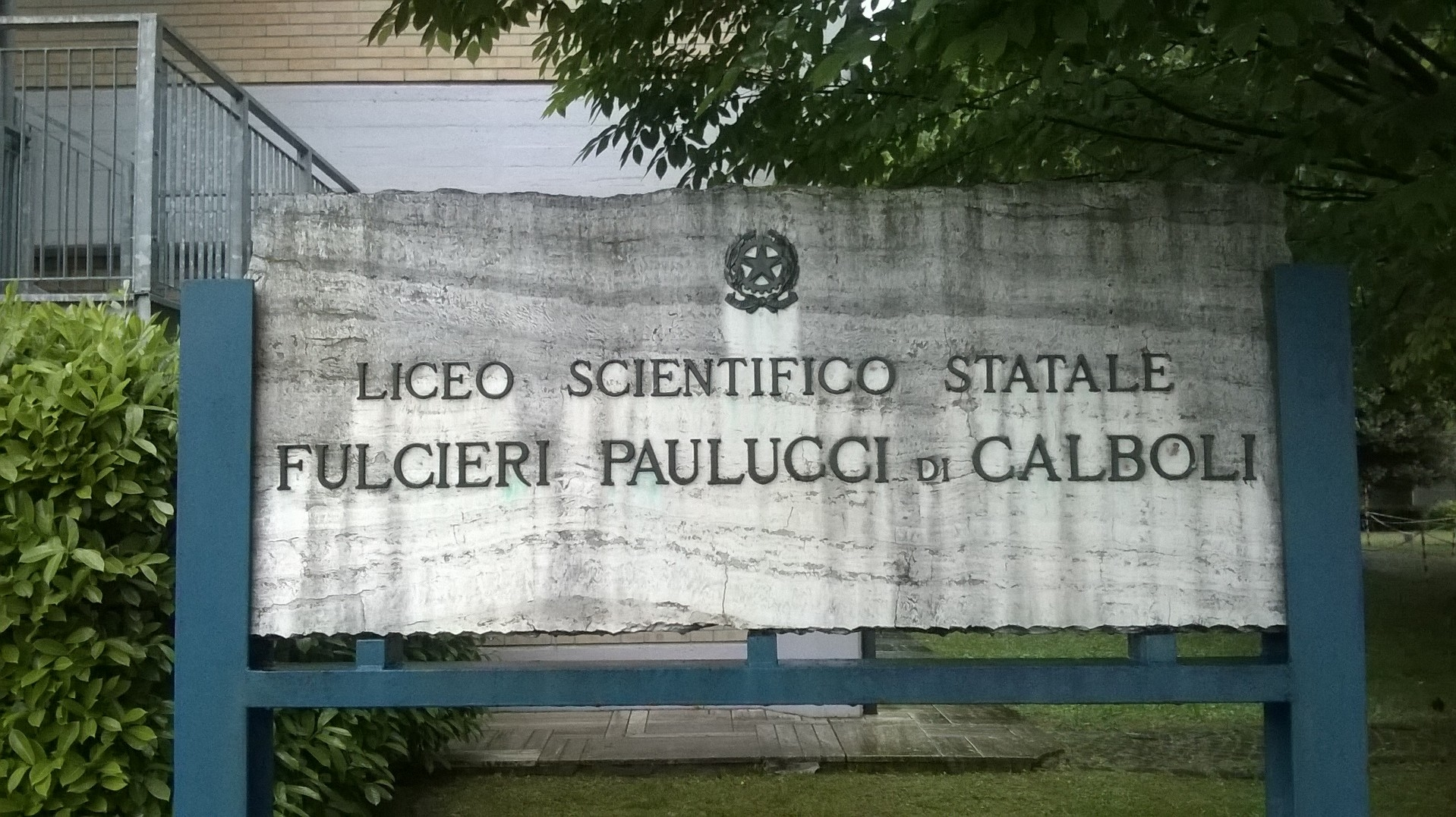 Entrata principale via Aldo Moro